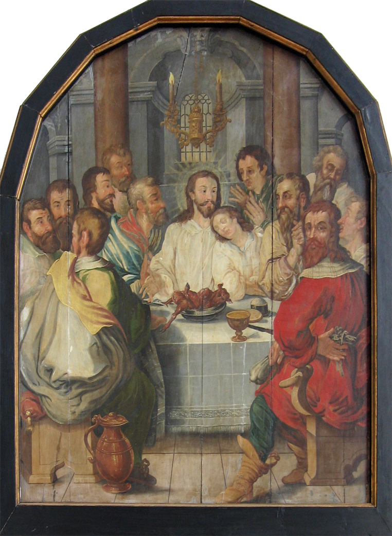 Painting from Haderslev Domkirke, Denmark Last supper 25.08.06 JEK